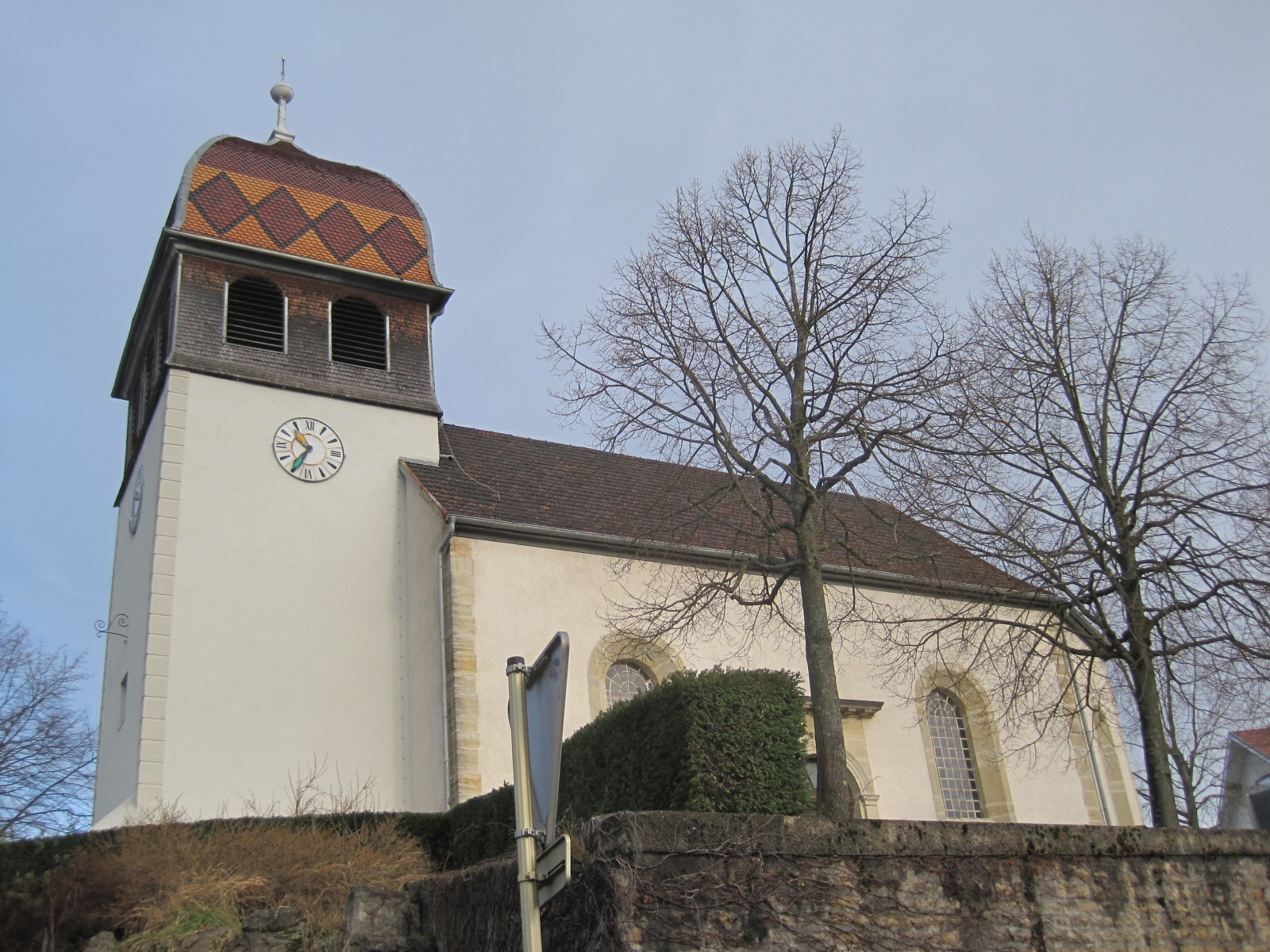 Église d'Étupes